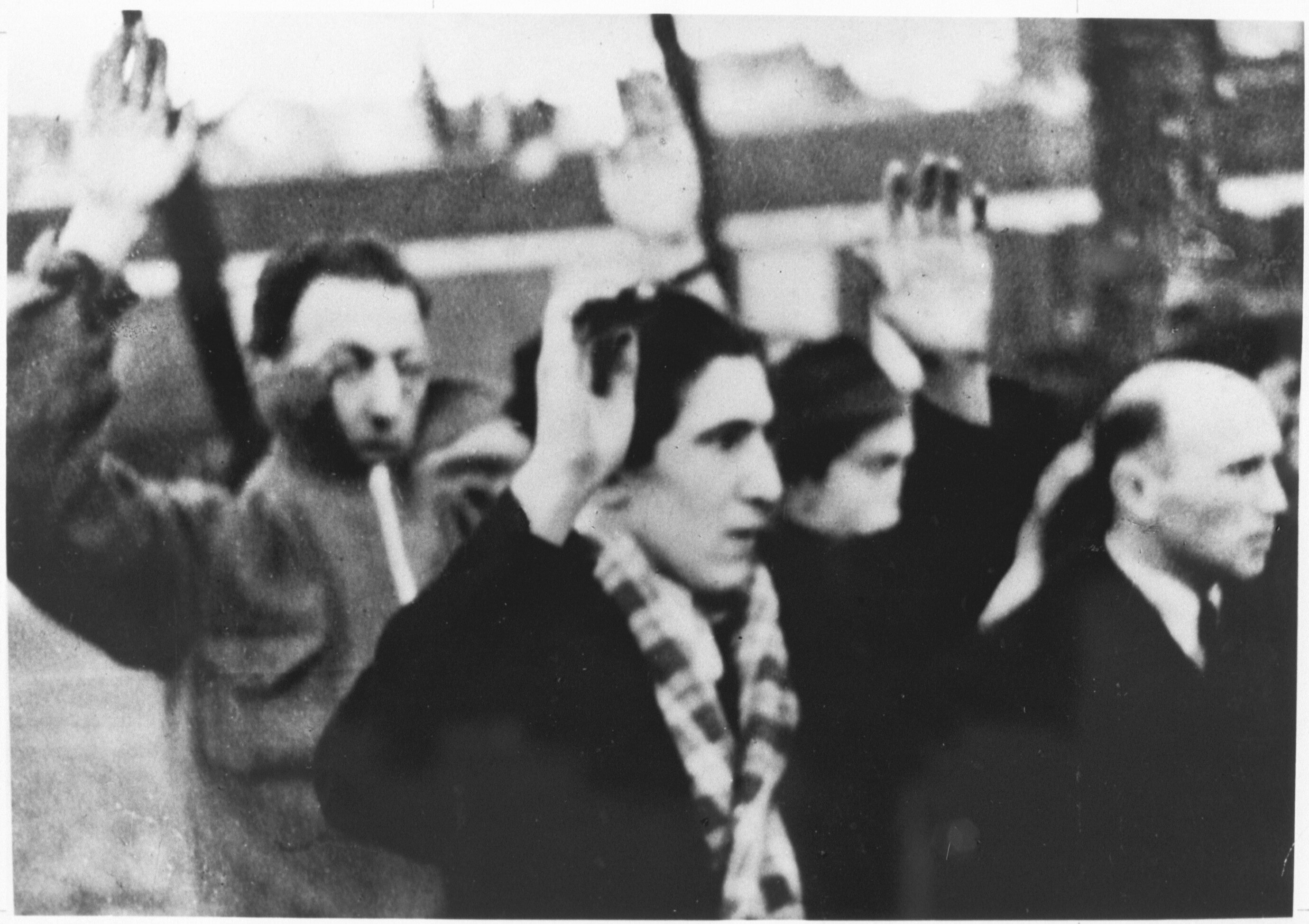 Razzia op Joden, Jonas Daniël Meijerplein. Himmler, Seyss-Inquart en Rauter besloten een voorbeeld te stellen: de eerste razzia op joden werd een feit. Op zaterdagmiddag 22 februari 1941 verscheen een colonne Duitse vrachtwagens in de buurt van het Waterlooplein. De omgeving werd geheel afgezet. Op meedogenloze wijze werden jonge joodse mannen op het Jonas Daniël Meijerplein bijeen gedreven. Ook op de dag daarop werden vele joodse mannen opgepakt. In totaal 427 joden tussen de twintig en vijfendertig jaar werden afgevoerd naar het Kamp Schoorl.